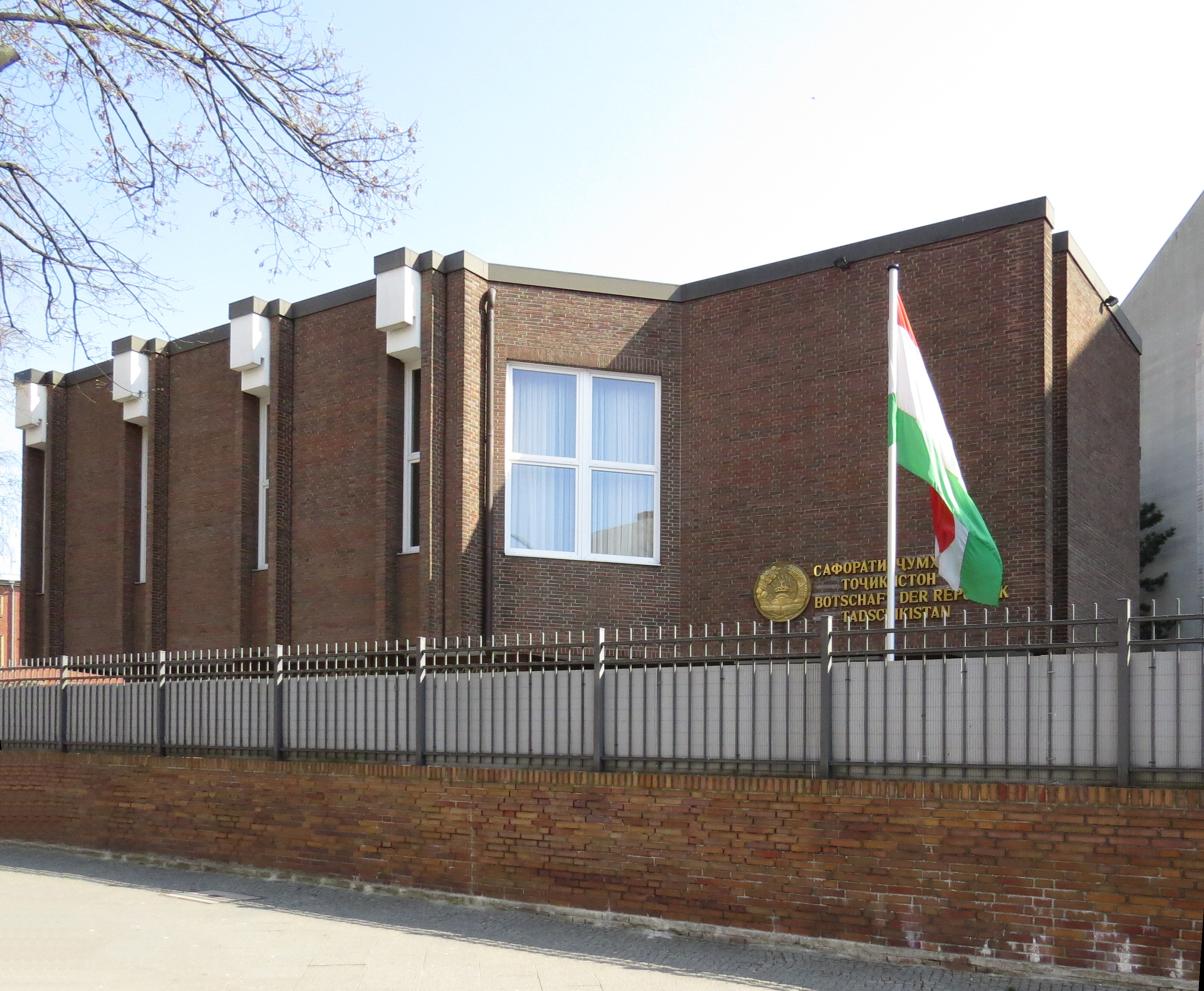 Botschaft der Republik Tadschikistan